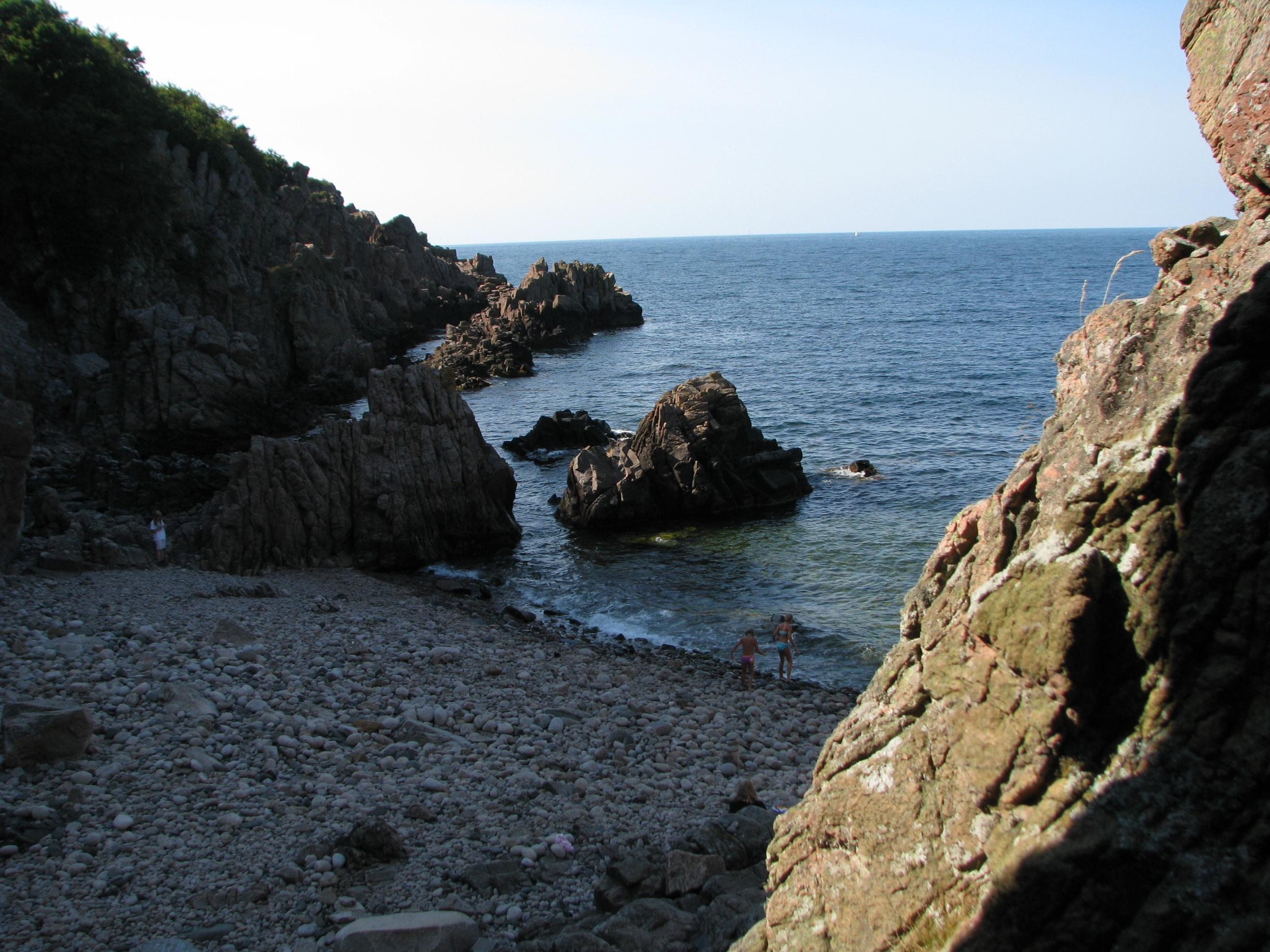 Felsburgen und Badebucht am Kullaberg.